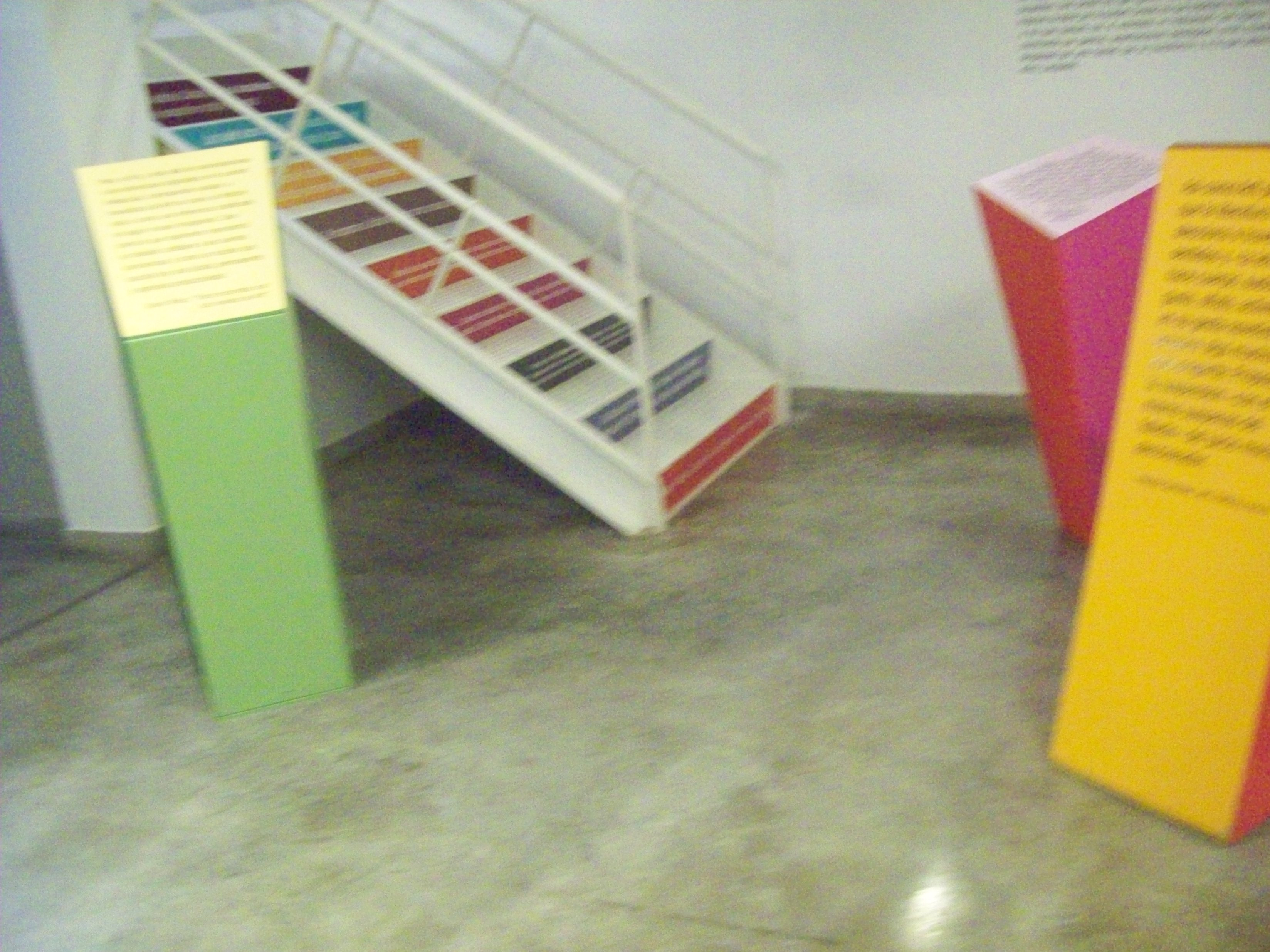 Museo del Libro y la Lengua